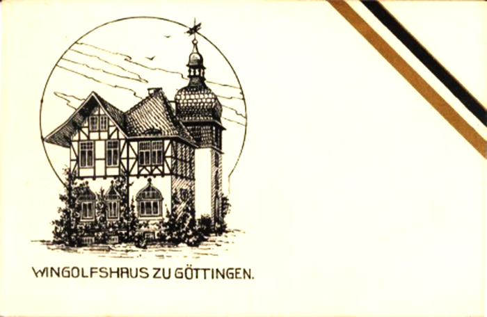 Couleurkarte des Göttinger Wingolf